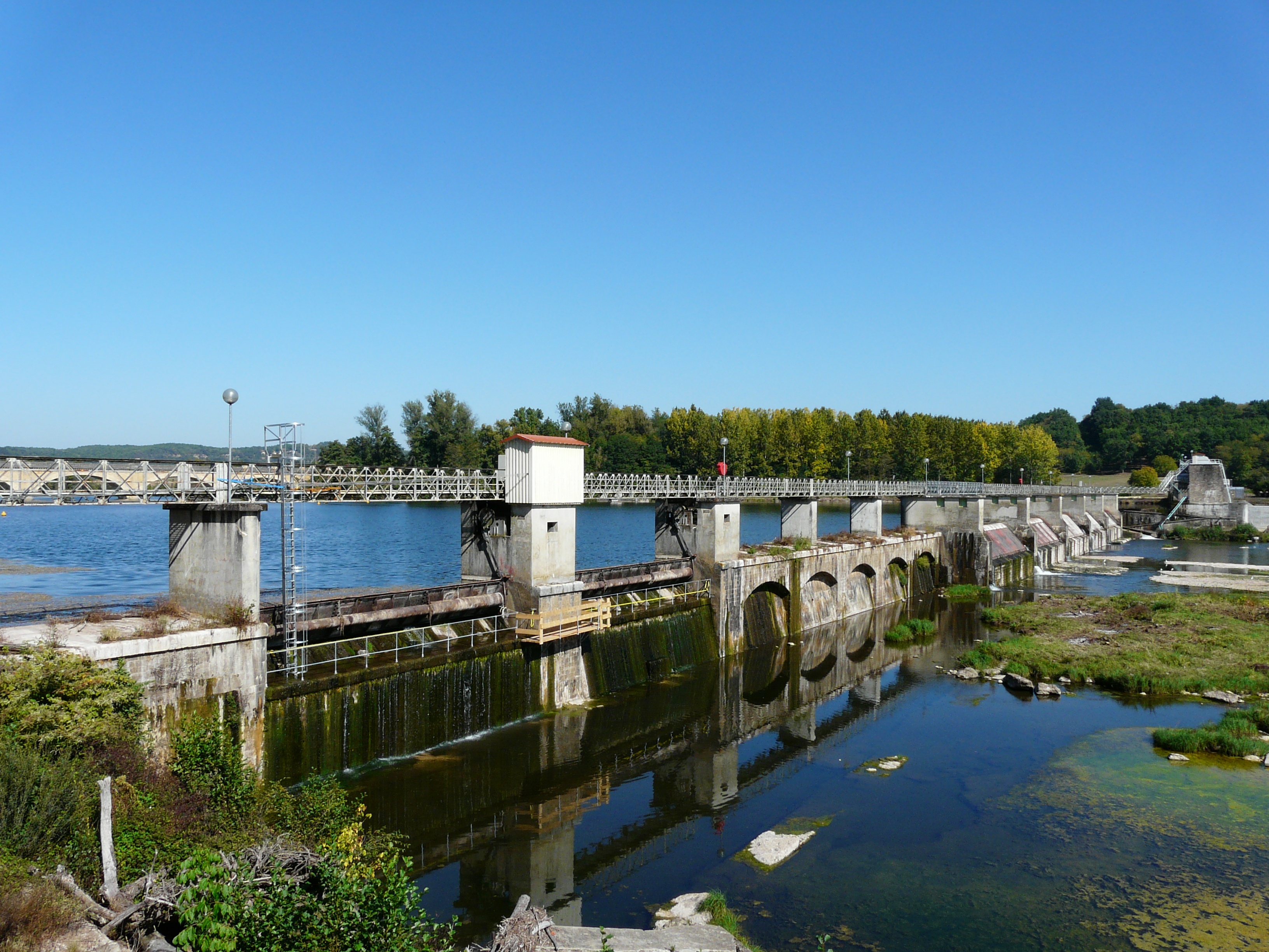 Le barrage de Mauzac sur la Dordogne entre Mauzac-et-Grand-Castang au premier plan et Calès au fond, Dordogne, France.